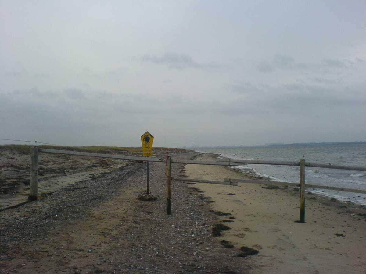 Westküste Poel. Grenze Naturschutzgebiet Fauler See - Rustwerder/Poel